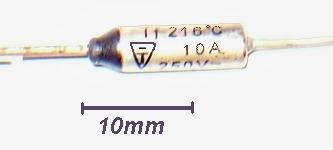 temperature circuit breaker 216°C